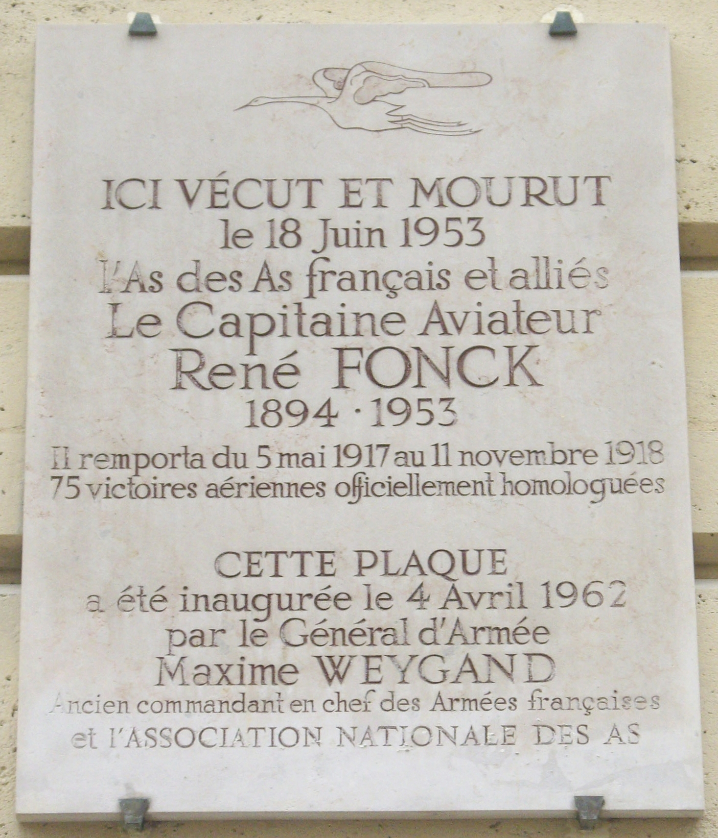 Plaque commémorative, 3 rue du Cirque, Paris 8e.« Ici vécut et mourut le 18 juin 1953 l'as des as français et alliés, le capitaine aviateur René Fonck, 1894-1953. Il remporta, du 5 mai 1917 au 11 novembre 1918, 75 victoires aériennes officiellement homologuées.Cette plaque a été inaugurée le 4 avril 1962 par le général d'armée Maxime Weygand, ancien commandant en chef des Armées françaises, et l'Association nationale des as. »